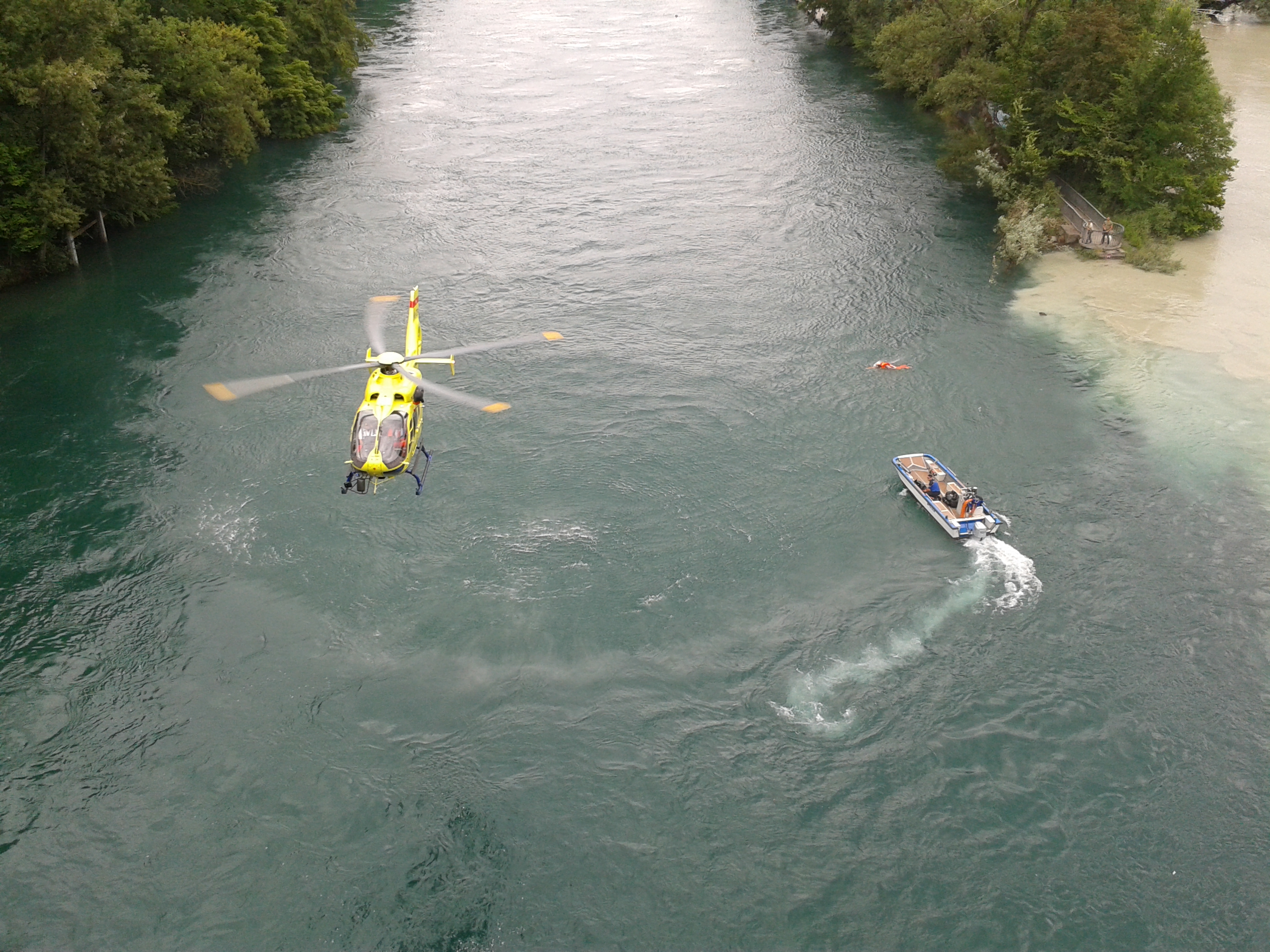 Des sauveteurs et des policiers à la recherche d’un noyé à la confluence du Rhône et de l’Arve, à Genève, Suisse. L’homme sera repêché dans une heure (peu avant 17h30). Les soins prodigués ne réussiront pas à le réanimer.